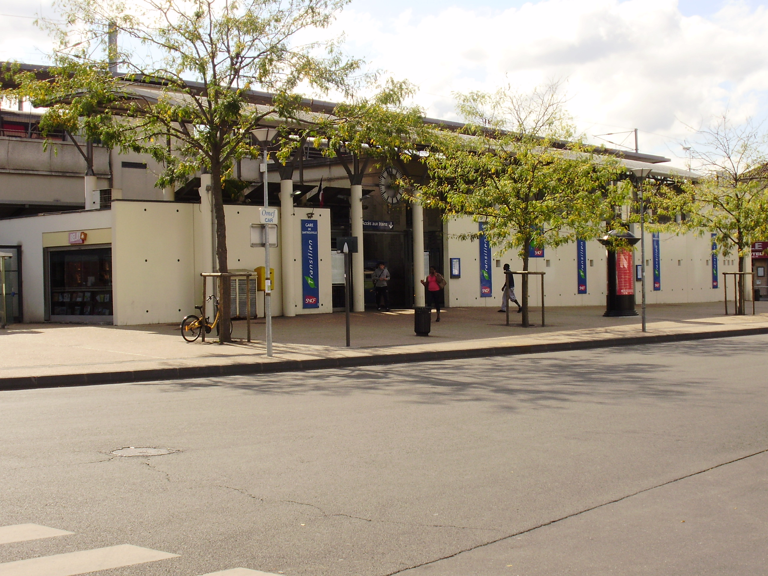 Gare de Sartrouville, Yvelines, France : entrée du bâtiment voyageurs depuis le nord-est de la place des Fusillés